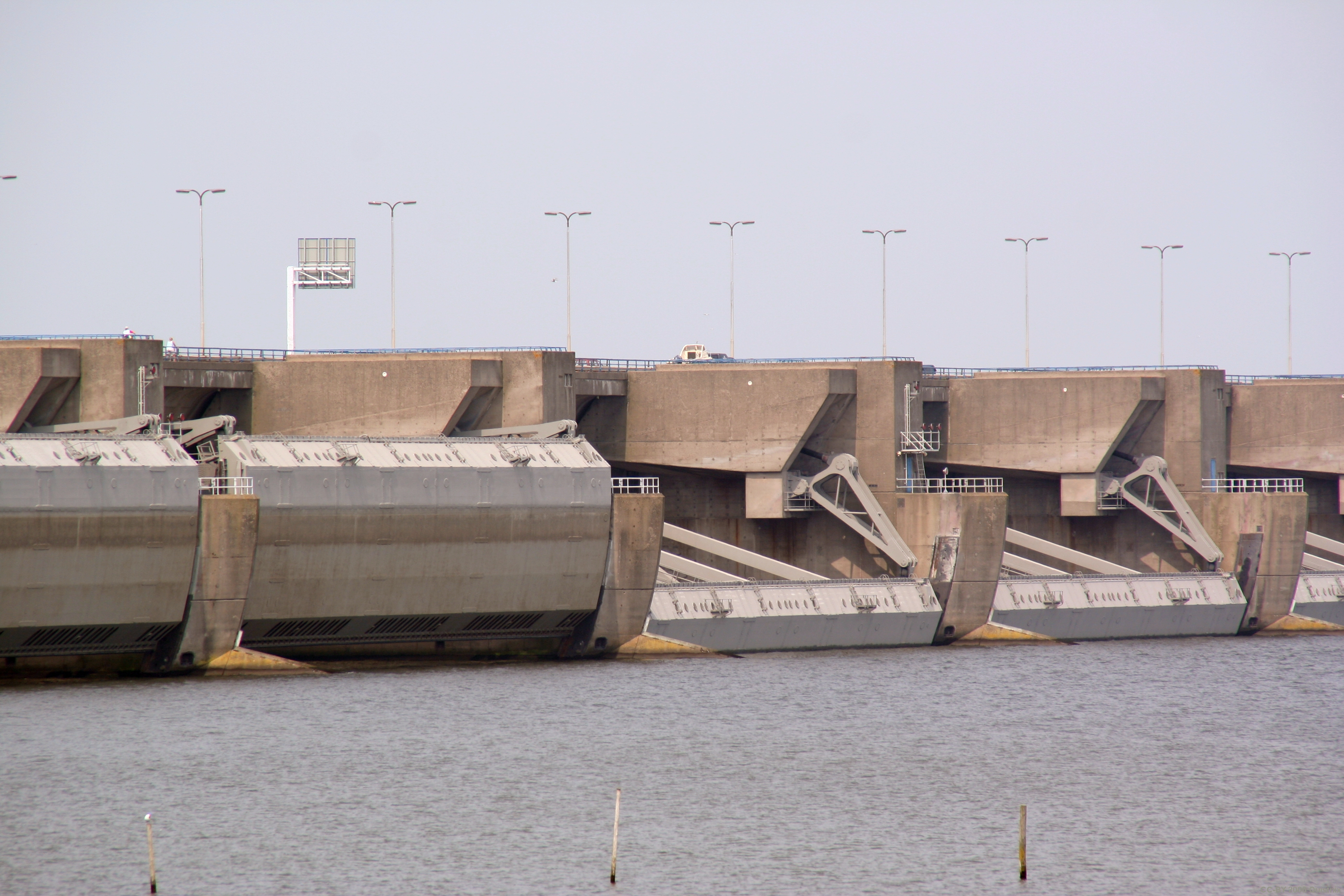 Deel van de Haringvlietdam, gezien vanaf de "zoete" kant op 18 juni 2006. Twee geopende en twee gesloten deuren. Eigen werk. Its number in the list of 89 proposed monuments is: 2013-68 For more information see Dutch Wikipedia: 89 topmonumenten uit de periode 1959-1965 Categorie:Afbeelding havengebied Rotterdam